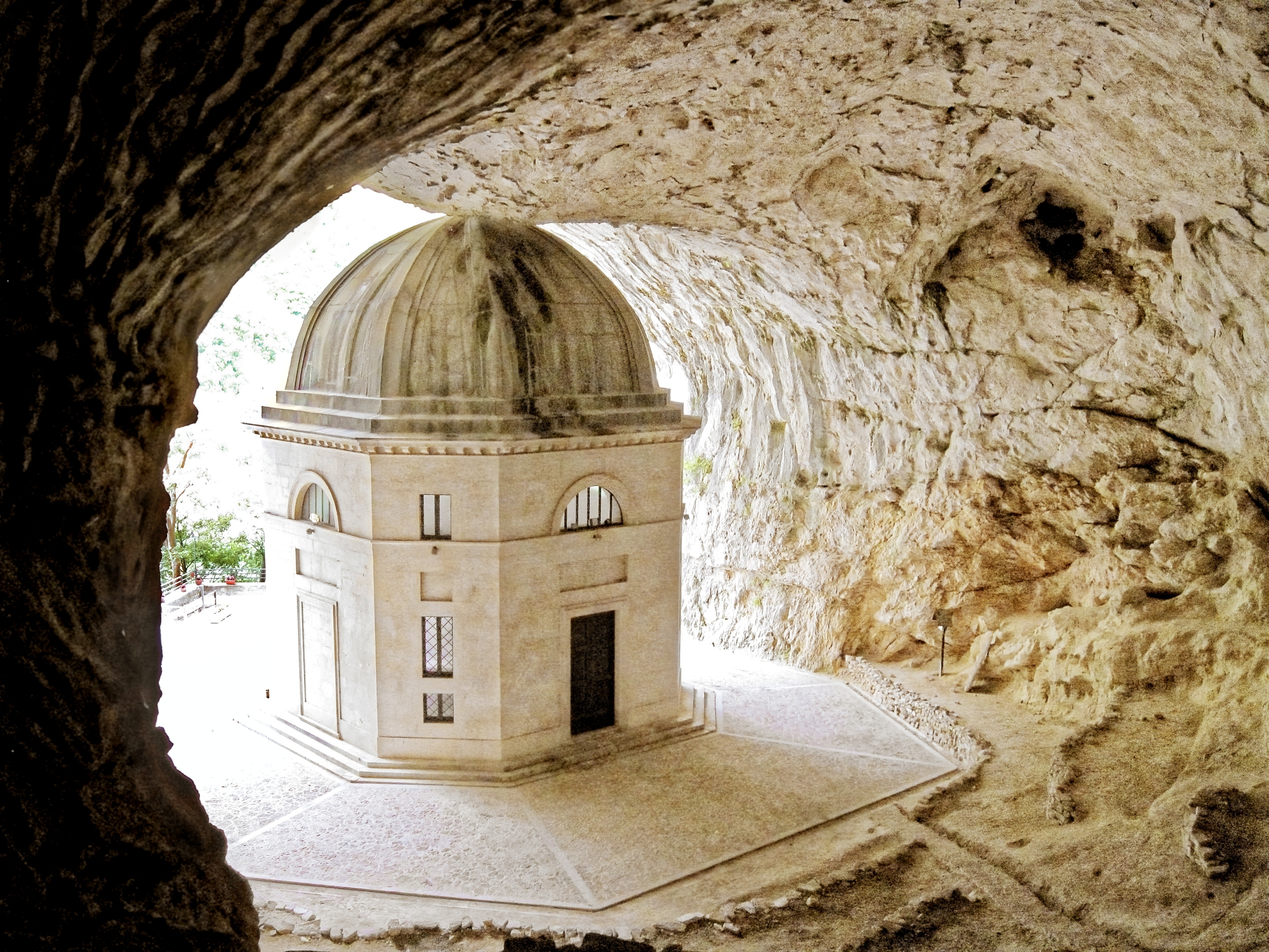 Tempio neoclassico, detto del Valadier, Genga, Italien